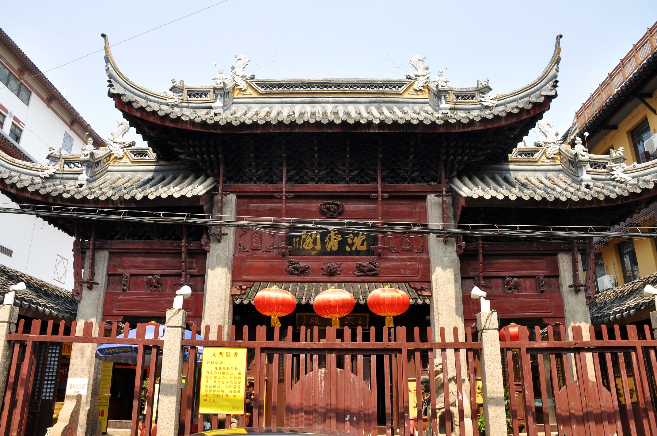 沉香阁 黄浦区豫园街道沉香阁路29号 明万历年间(1573～1620年)